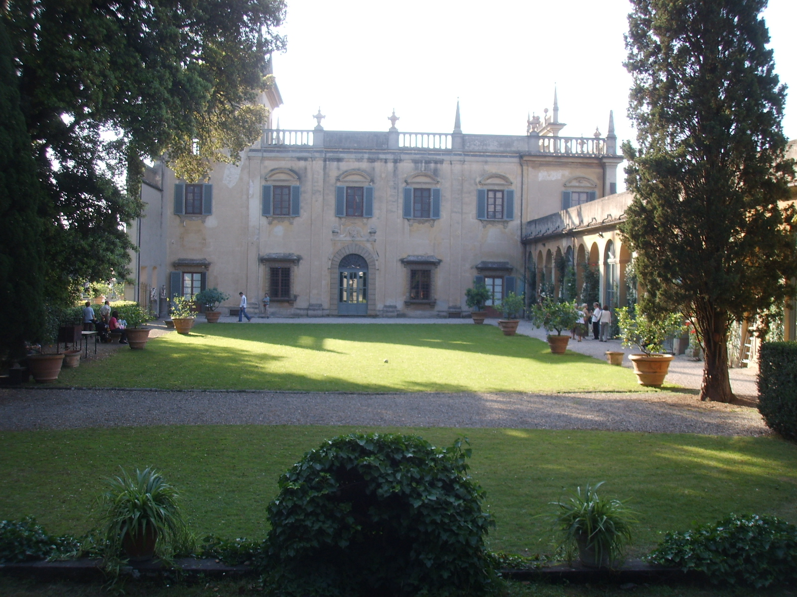 Villa guicciardini corsi salviati, giardino 06, veduta laterale